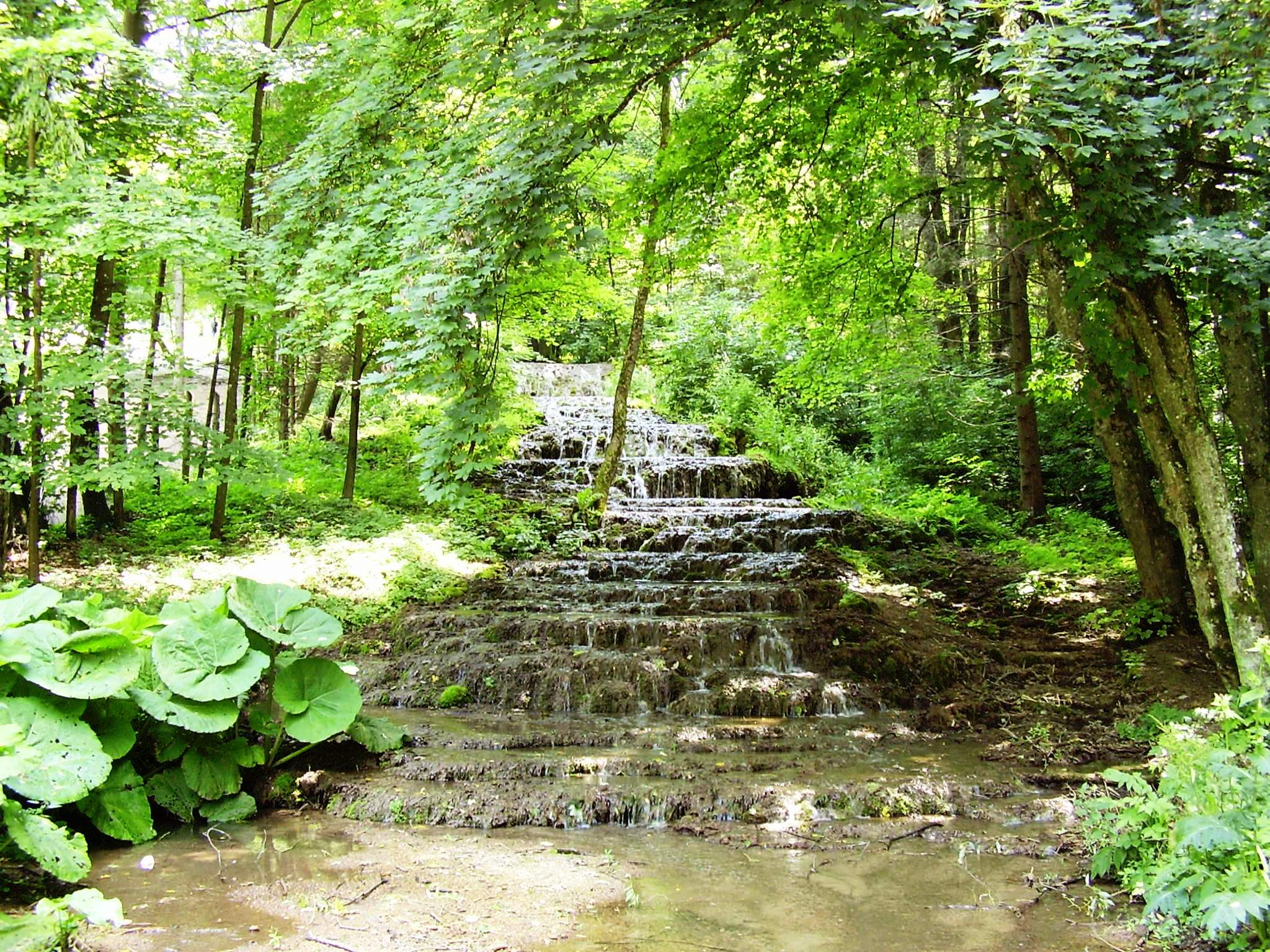 Szalajka-völgy Fátyol-vízesés (2015)